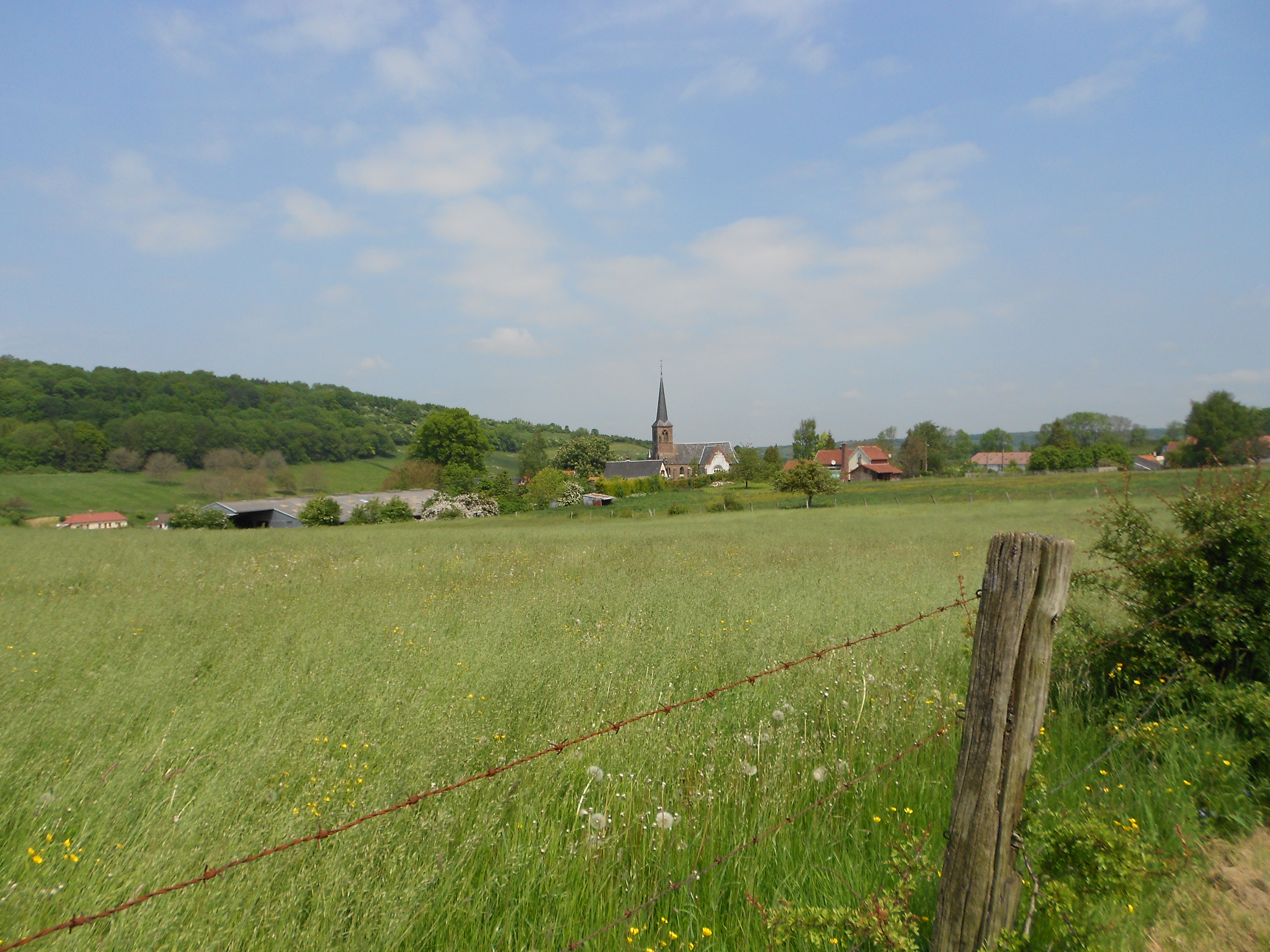 Vue du village par le Sud.